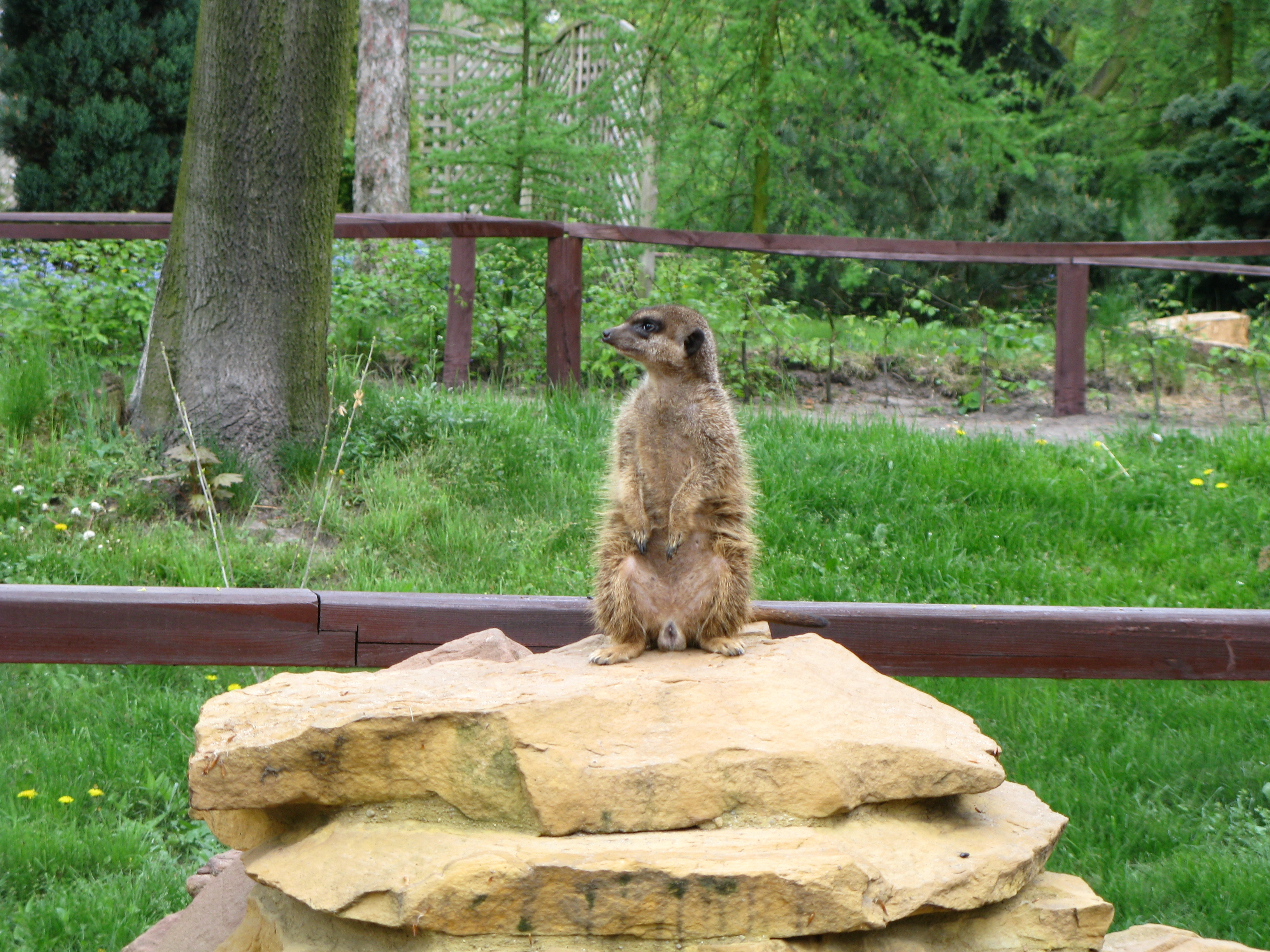 Suricata suricatta in Zoobotanical Garden in Toruń